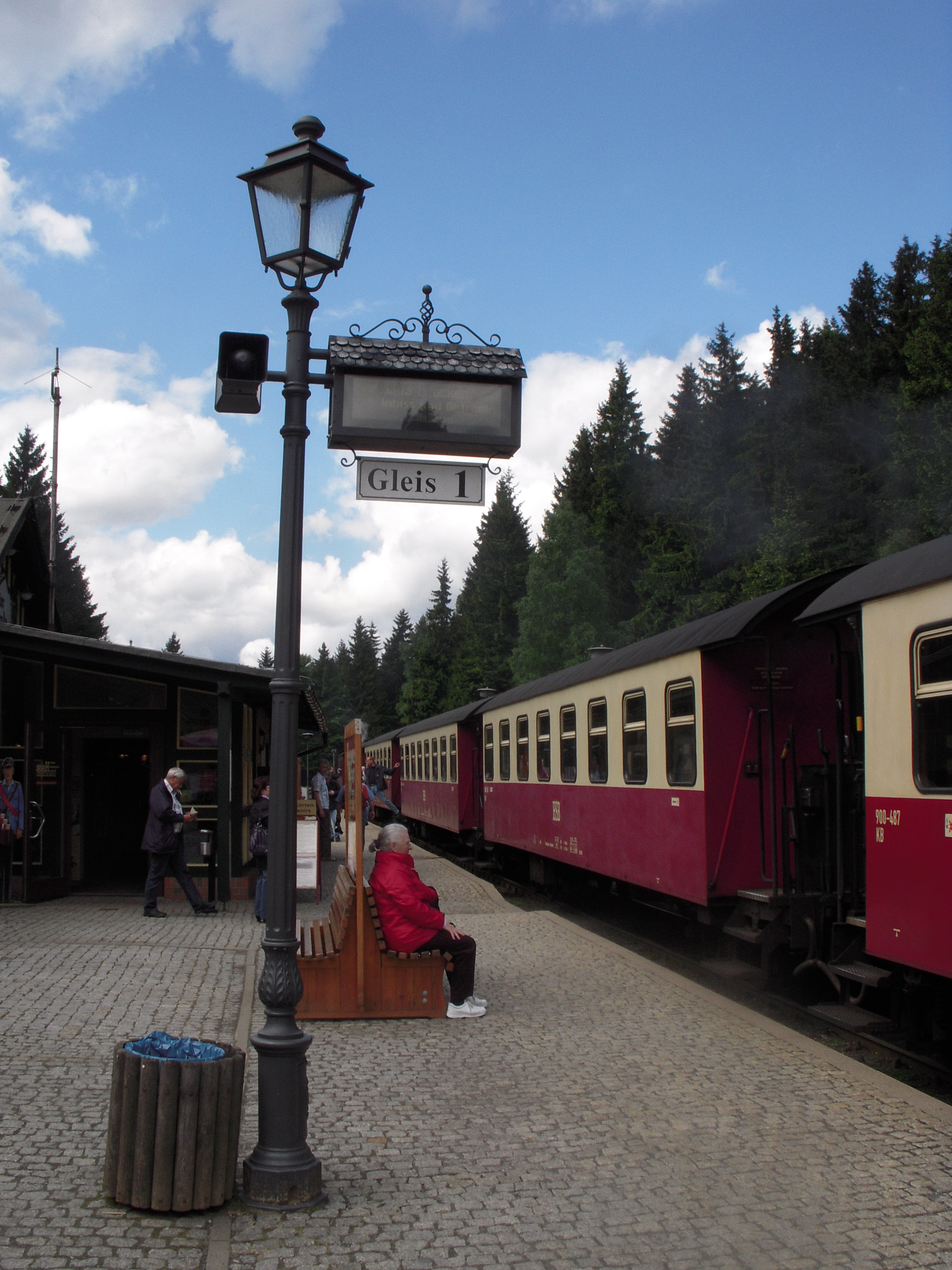 Perron 1 på Bloksbjergbanens Schierke Station